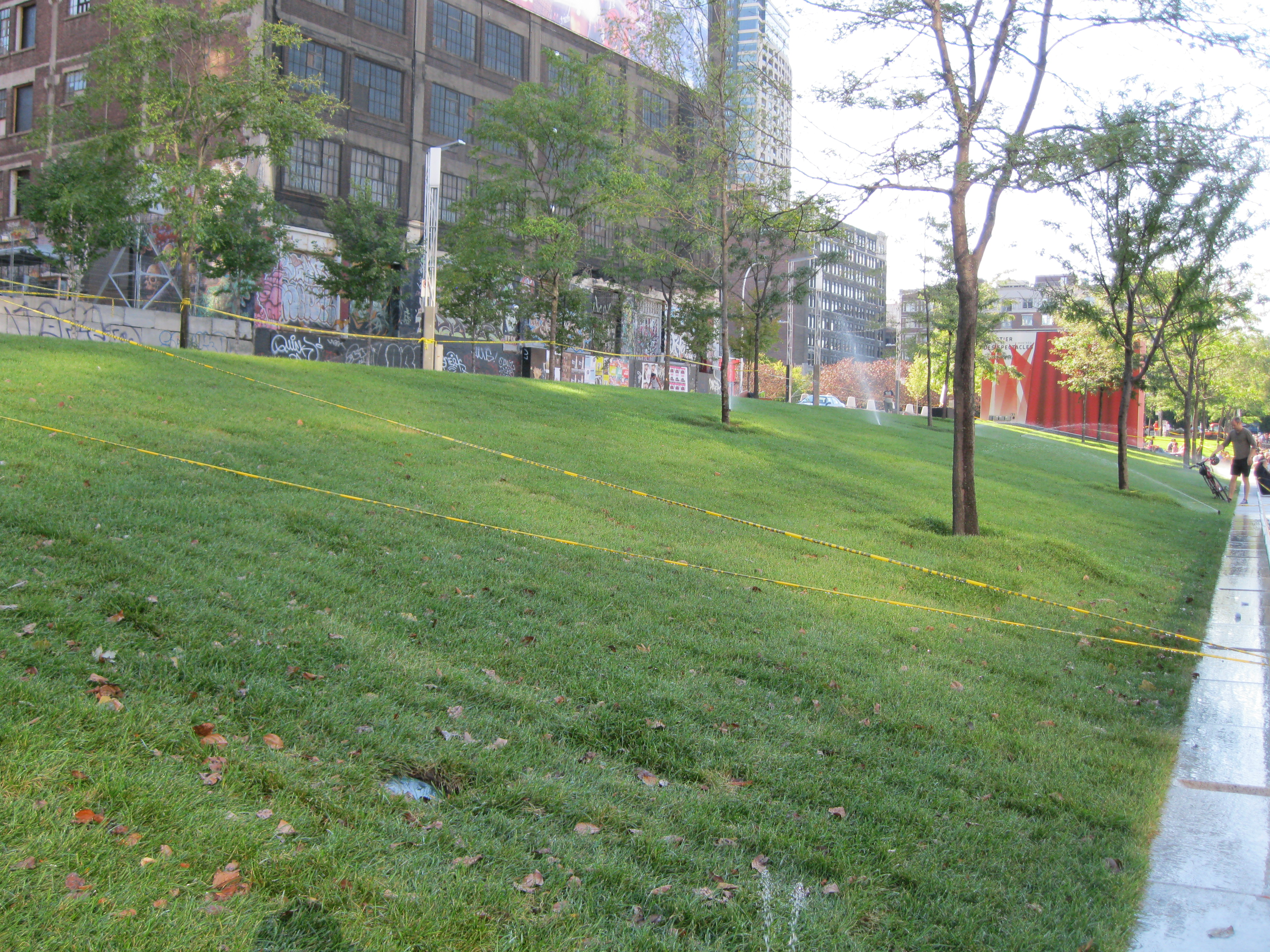 Après un été très chaud, des employés du Quartier des Spectacles ont posé un nouveau gazon qui est arrosé à la place des Festivals